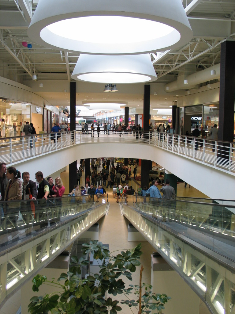 Centrum Manufaktura